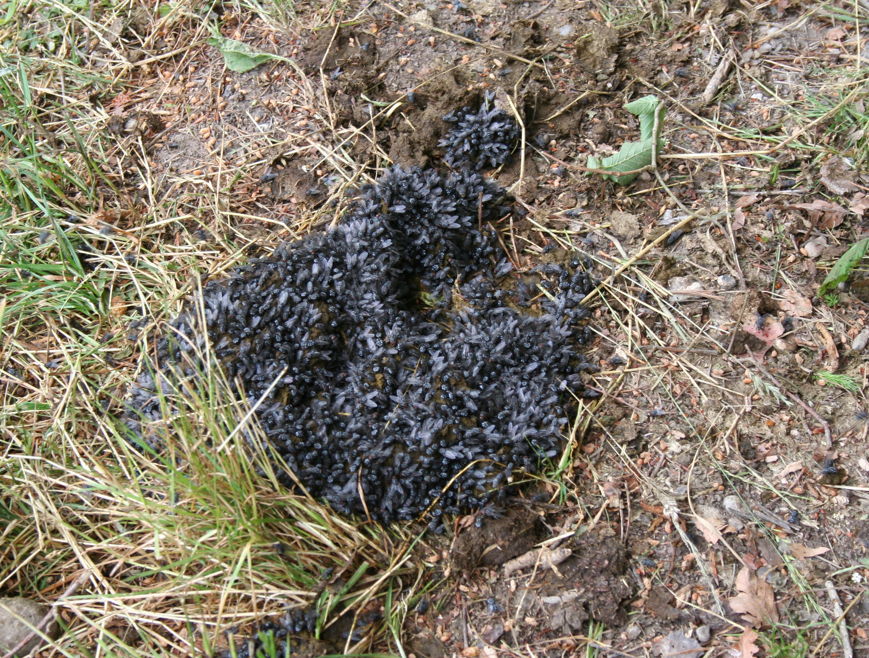 Schmeißfliegen auf einem Kuhfladen